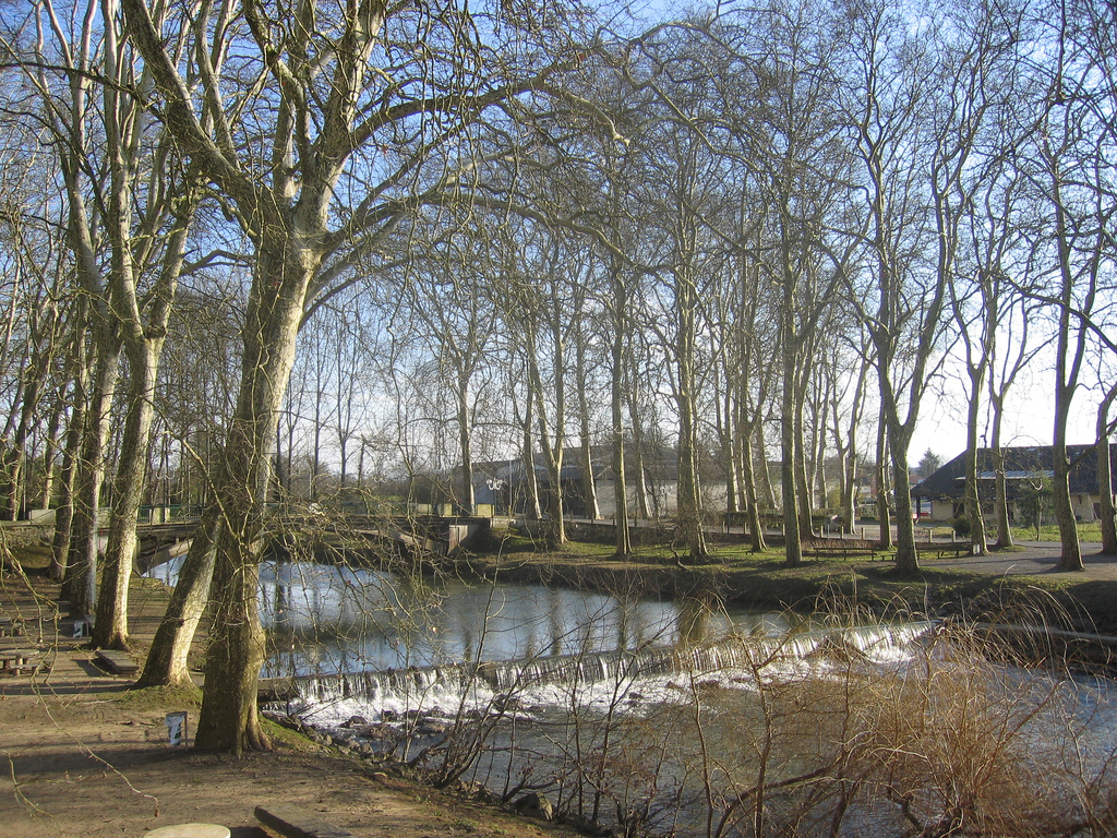 AMOU: Altitude 47 m. - 1488 habitants - Paris 800 km. - Amou se situe en Chalosse dans le sud des Landes à 31 km de Dax, ville thermale, à 14 km d'Orthez et 51 km de Mont de Marsan. Les gares SNCF les plus proches sont Dax et Orthez. Les aéroports: Pau Pyrénées et Biarritz Parme. Bordeaux se situe à 2 h. (source: office du tourisme d'Amou) La rivière photographiée ici est le Luy de Béarn.